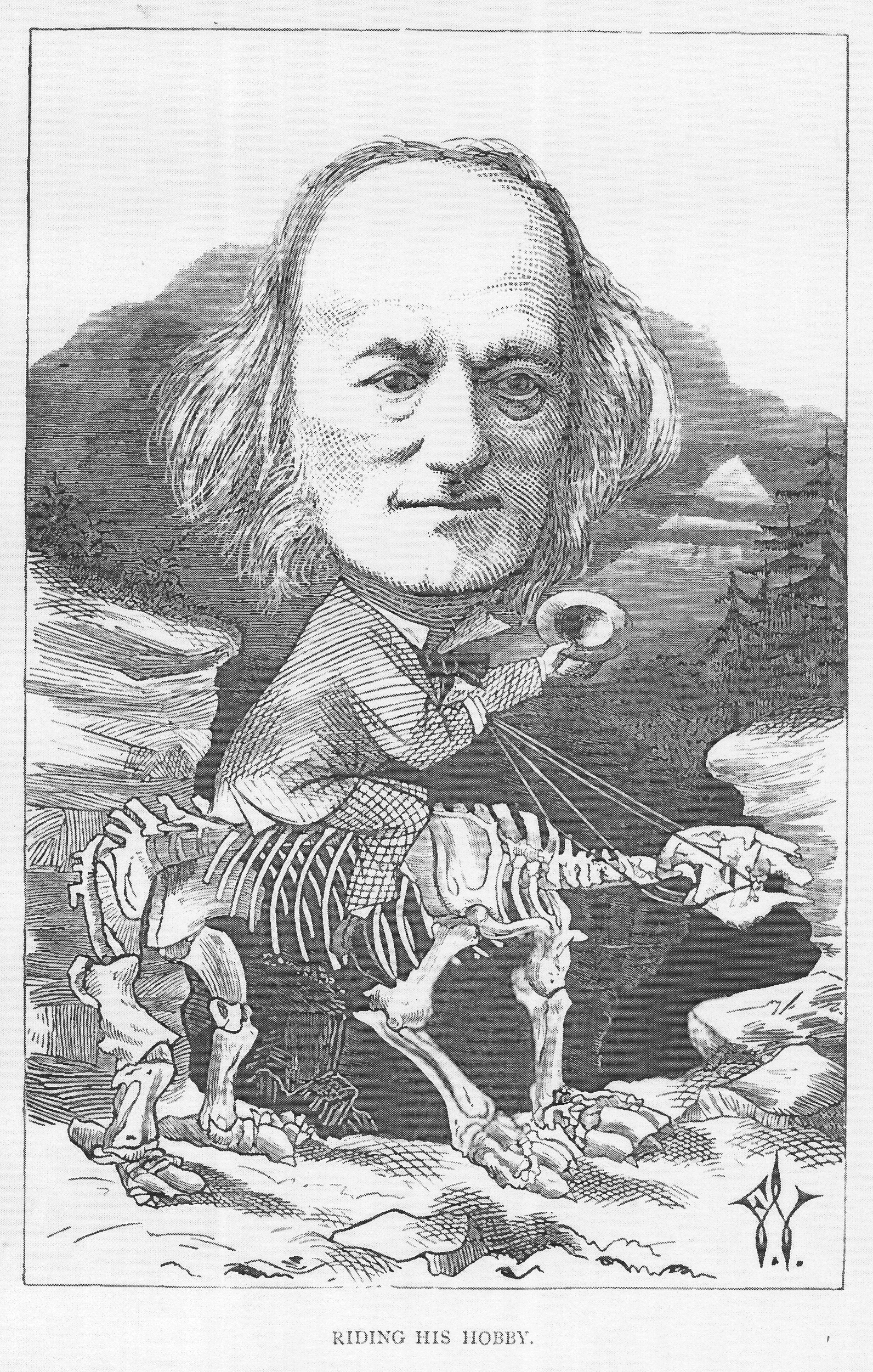 Karikatur von Frederick Waddy: Richard Owen "Riding His Hobby" (1873)